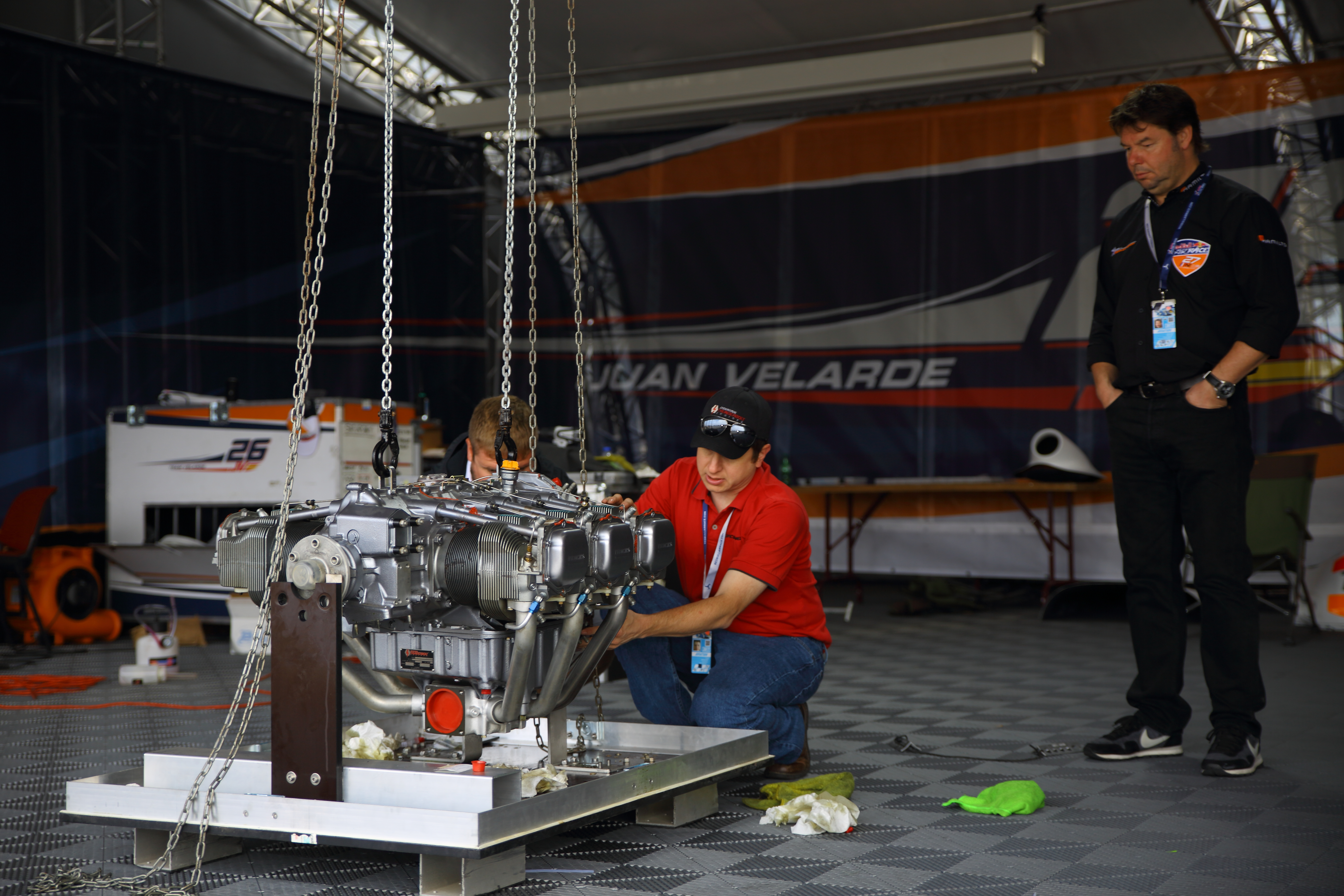 2 y 3 de septiembre, en la ciudad de Oporto